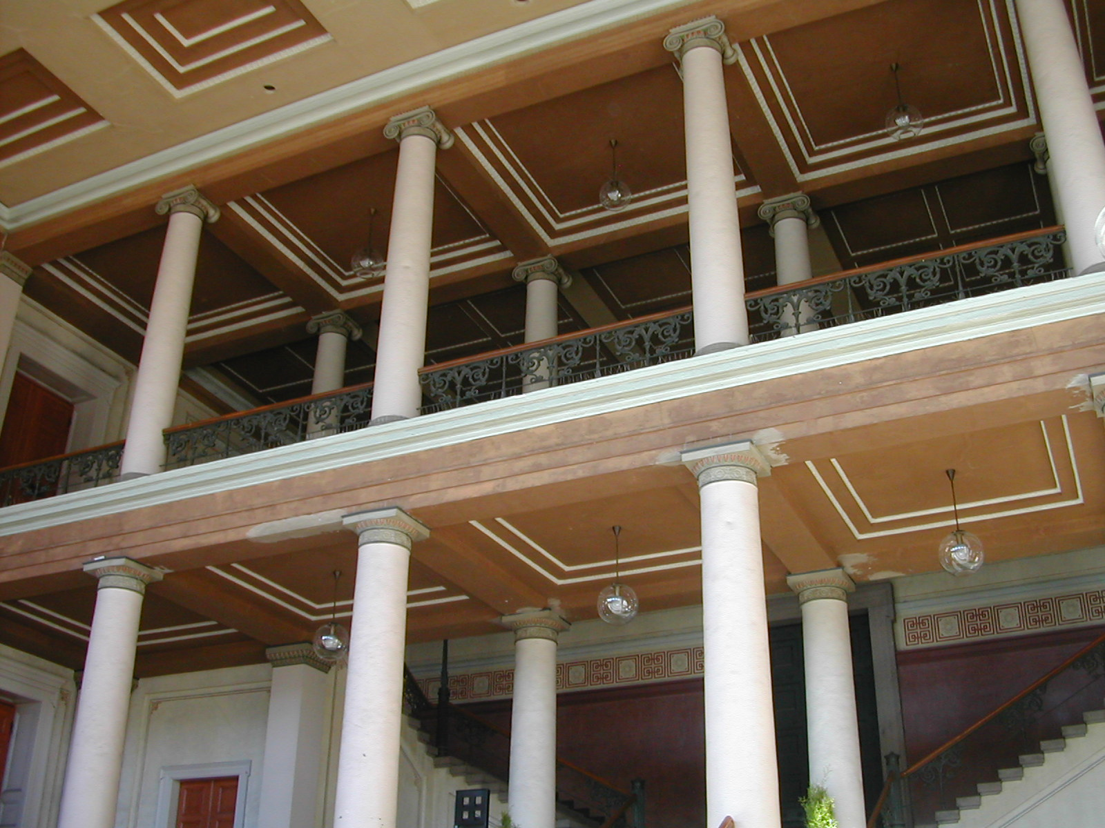 Midtbygningen, Universitetet i Oslo (Karl Johan)